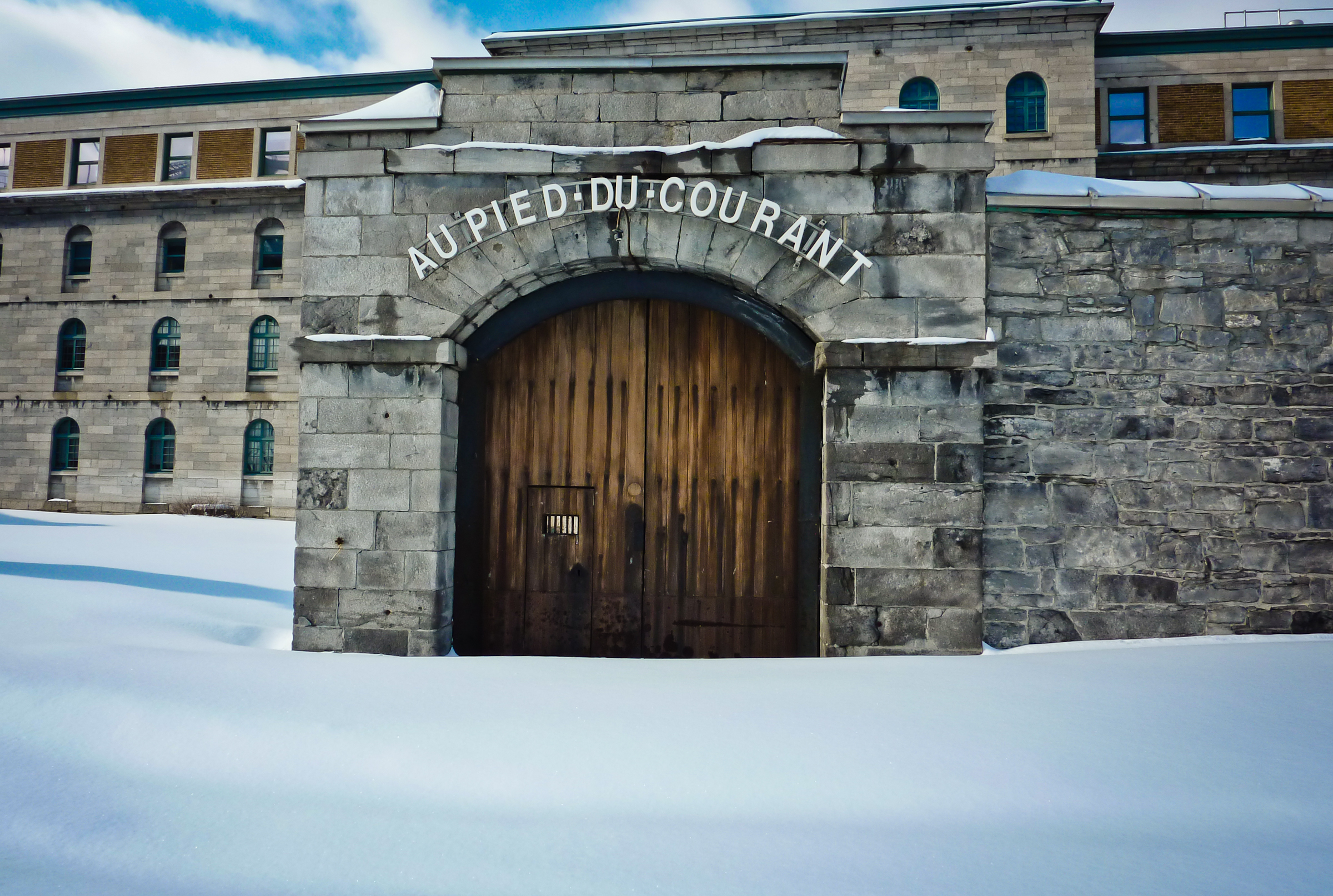 Prison des Patriotes-au-Pied-du-Courant, 905, avenue De Lorimier, (Canada). (Protection MH classé. Voir la liste des lieux patrimoniaux de Montréal pour plus de détails).